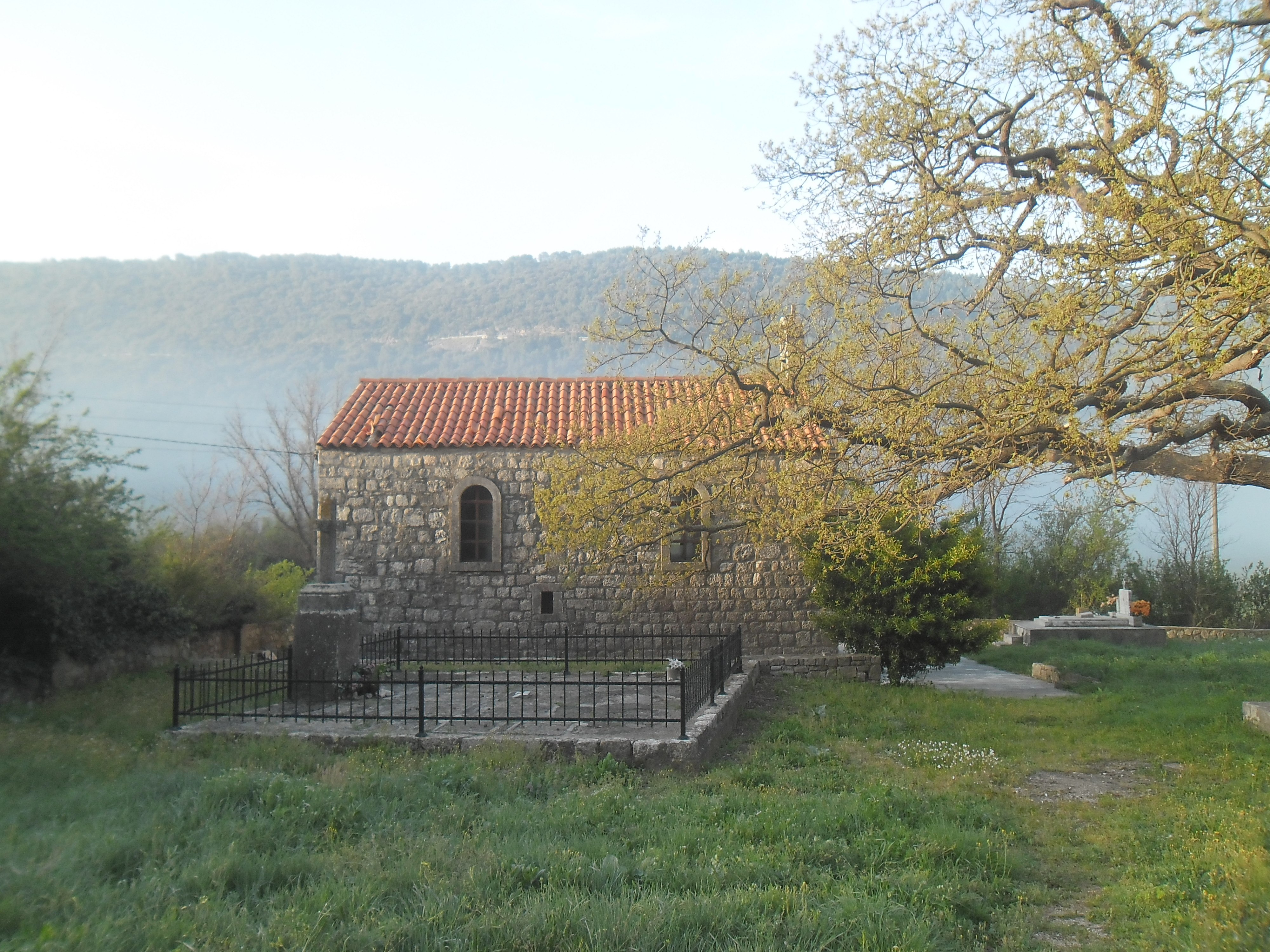 Blato na otoku Mljetu